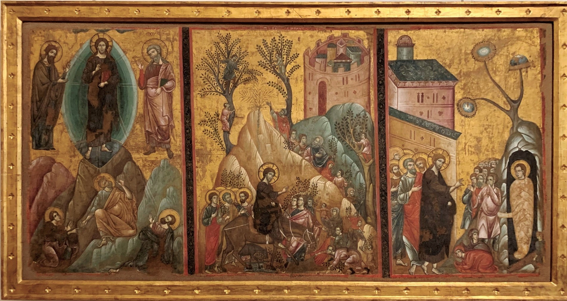 Guido da siena, Trasfigurazione, entrata di Cristo a Gerusalemme e resurrezione di Lazzaro